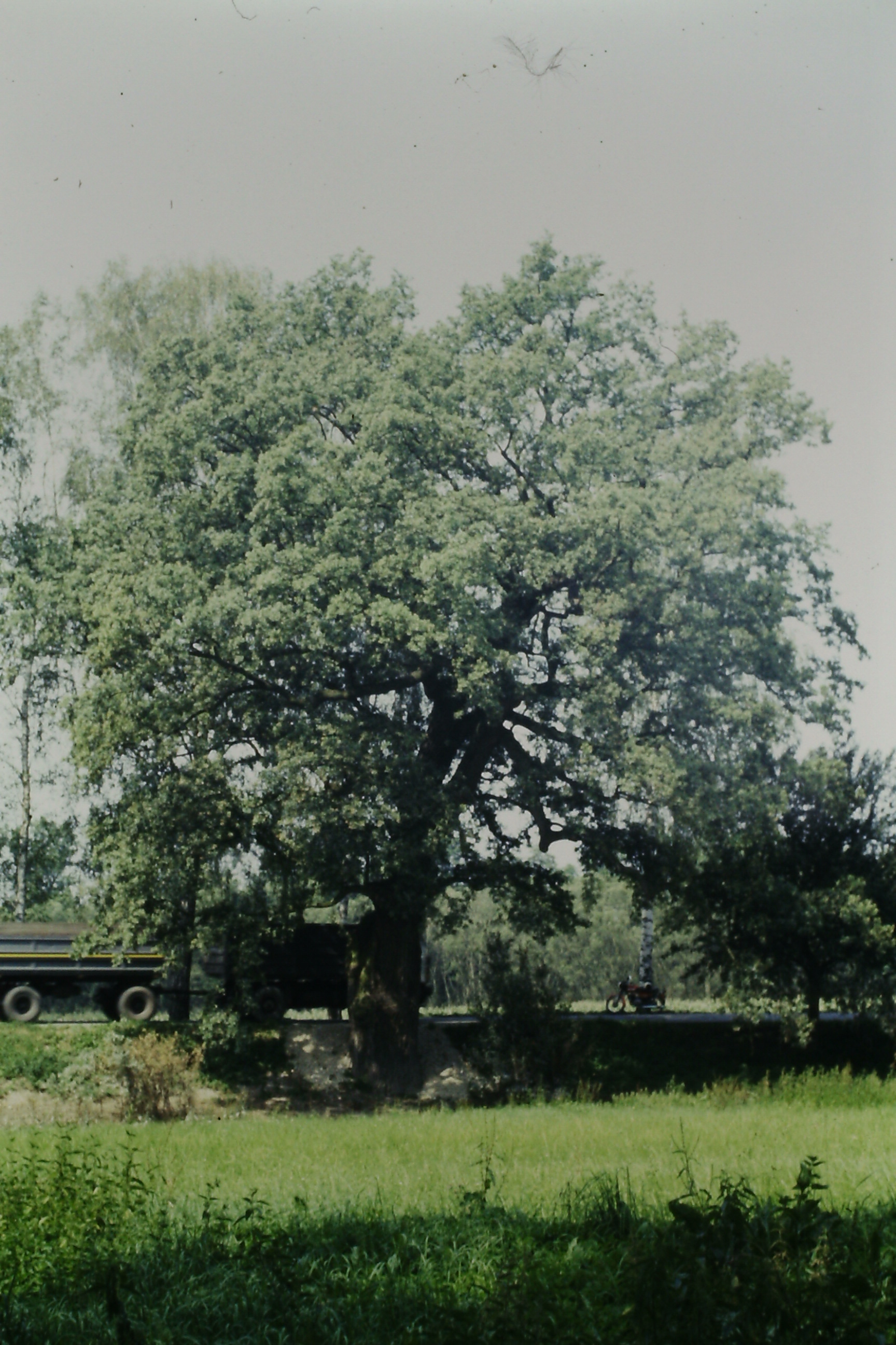 Žižkův dub